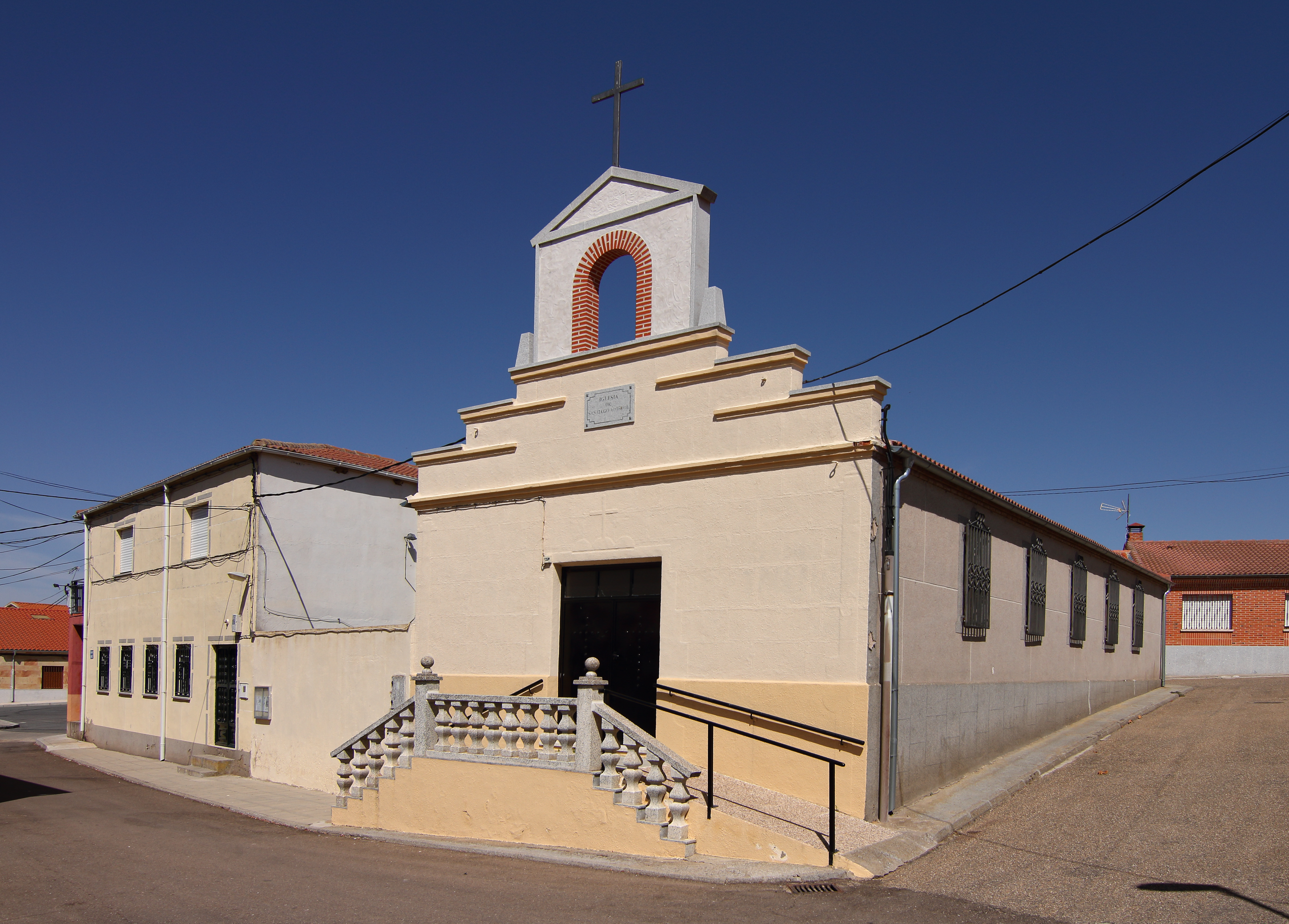 Iglesia parroquial de Cordovilla